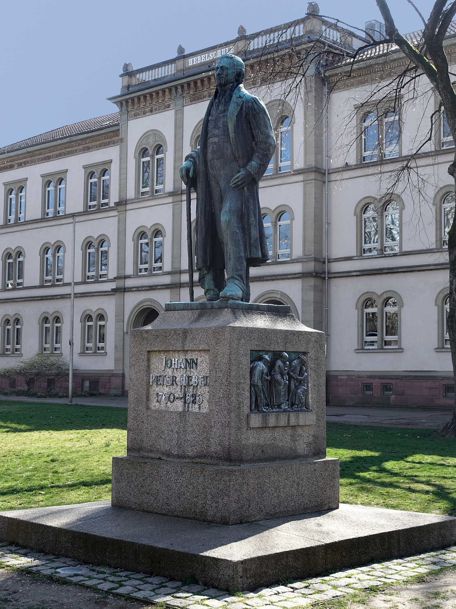 Johann Peter Hebel (1760–1826) Schriftsteller, Theologe, Pädagoge. Bronze Tafel am Denkmal, im Hebel Park vor der Hebelschule in Lörrach. Von Wilhelm Gerstel (1879–1963) Bildhauer. Angefertigt in der Giesserei Hans Clement in München.